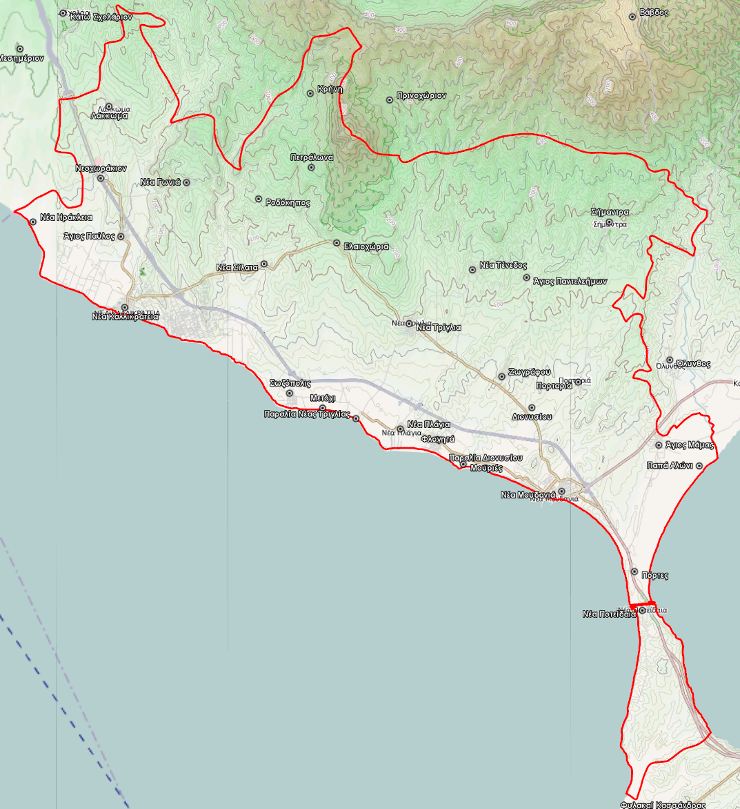 Τοπογραφικός χάρτης του Δήμου Νέας Προποντίδας